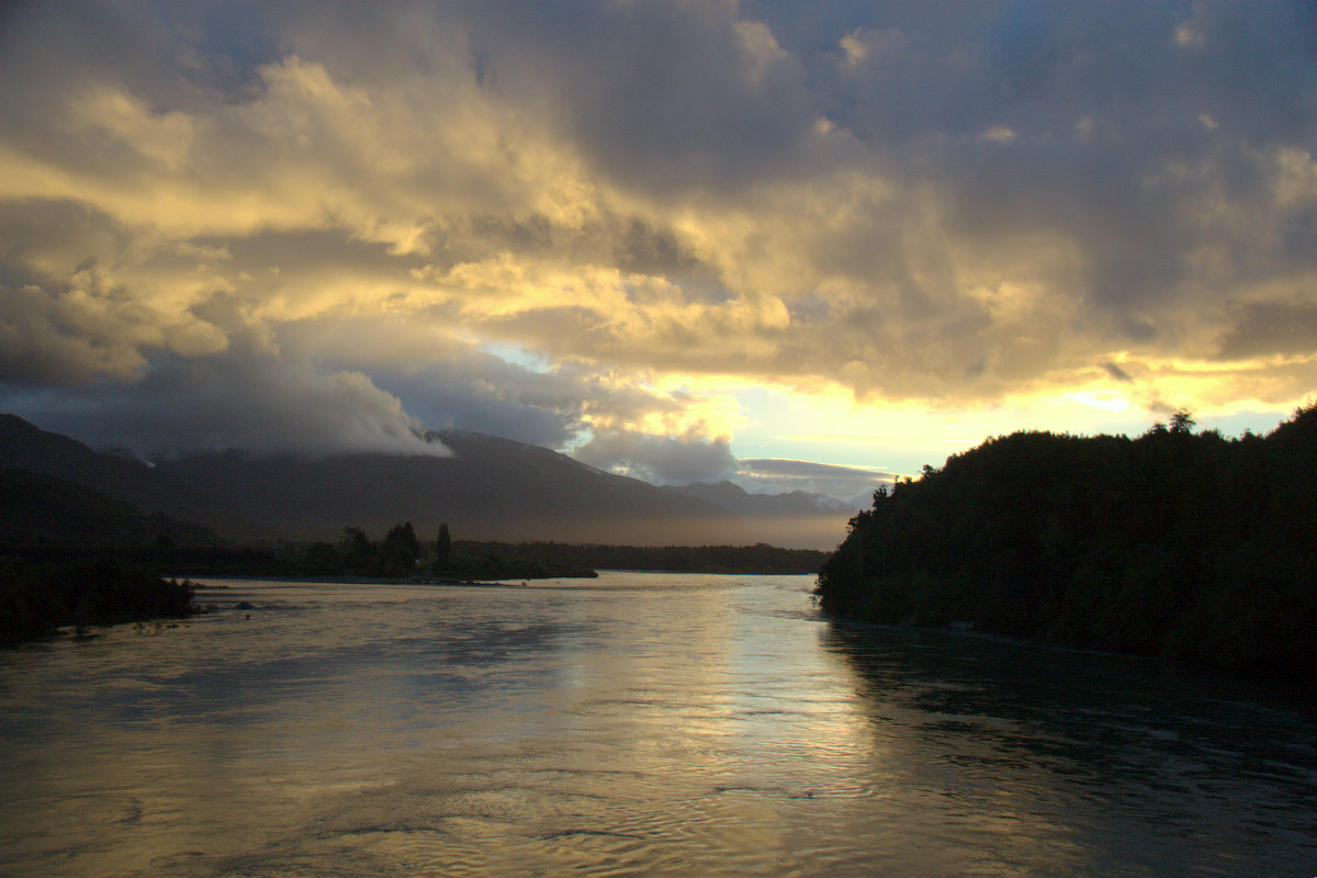 Vista del río Puelo desde el puente del Camino Austral hacia la desembocadura.